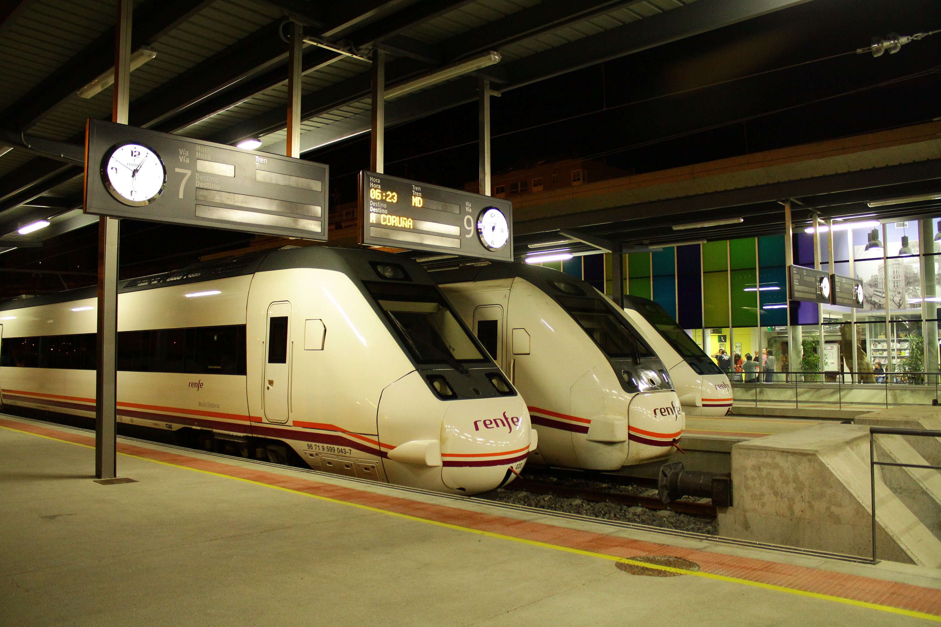 28 de agosto de 2011. Estreno de la nueva Estación de ferrocarril de Vigo-Guixar, construida para sustituir provisionalmente a la Estación de Urzáiz que será demolida en breve. New Station of Vigo-Guixar August 28th, 2011. Premiere of the new Railway Station Vigo-Guixar, built to temporarily replace Urzaiz Station which would be demolished shortly.